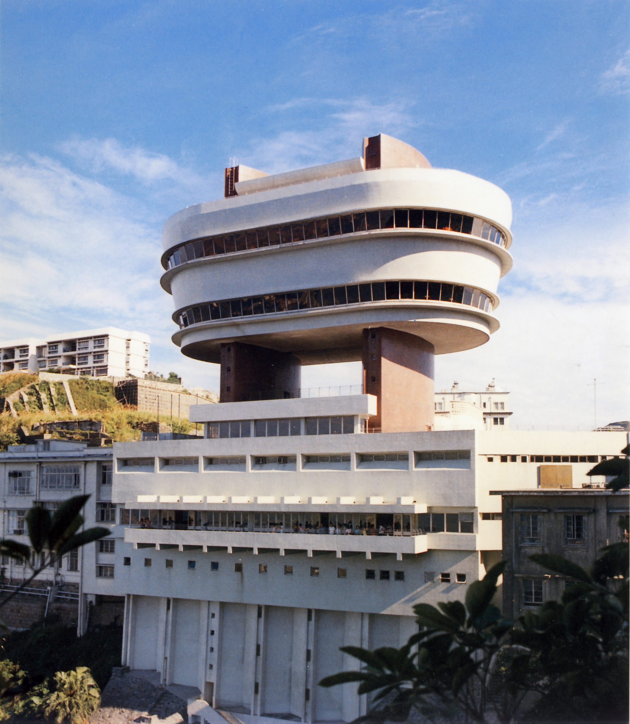 山頂 1970